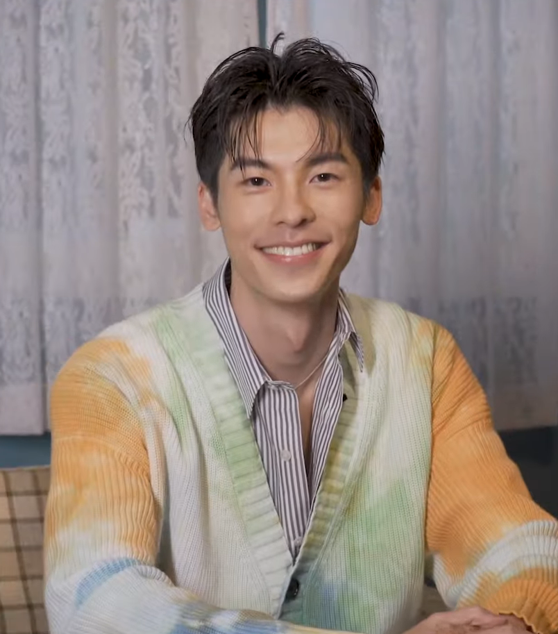 ELLE 4月封面人物－許光漢